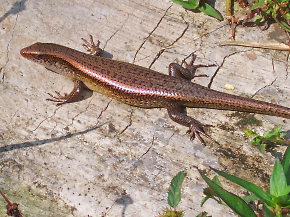 Mabuya multifasciata, female from Darmaga, Bogor, West Java, Indonesia